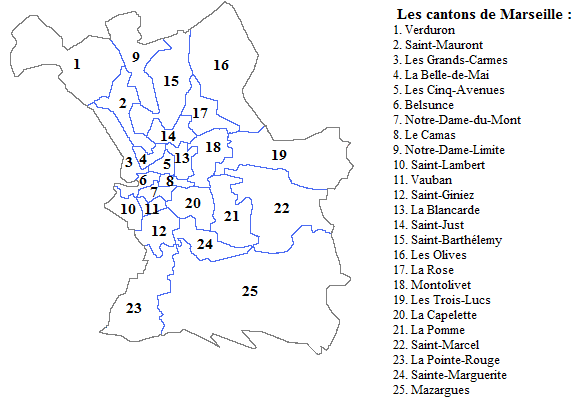 Le découpage des cantons de Marseille (France)